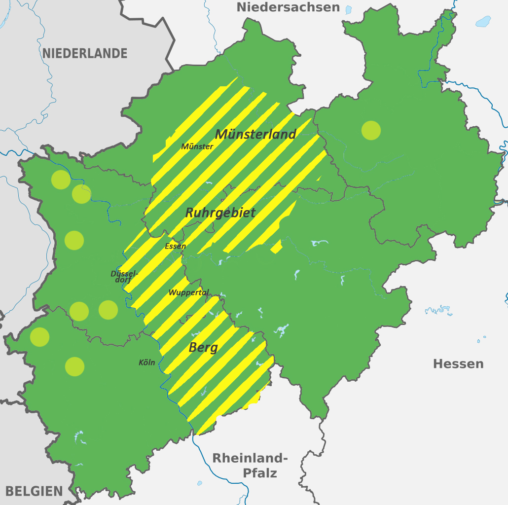 Voorkomen van Panhas in Noordrijn-Westfalen